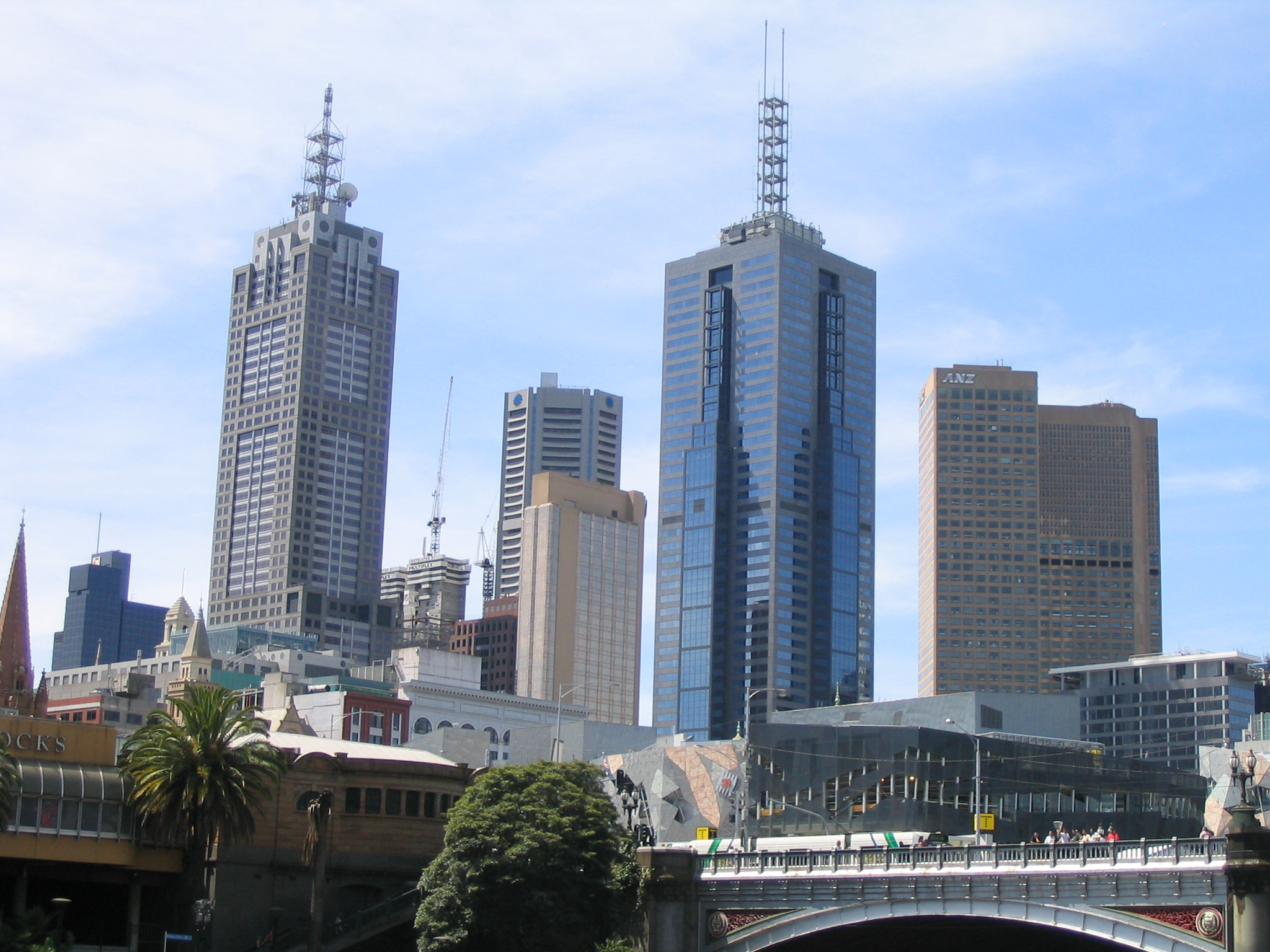 Melbourne. Centrum Melbourne.IMG_1610